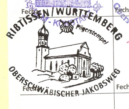 Jakobsweg in Baden-Württemberg